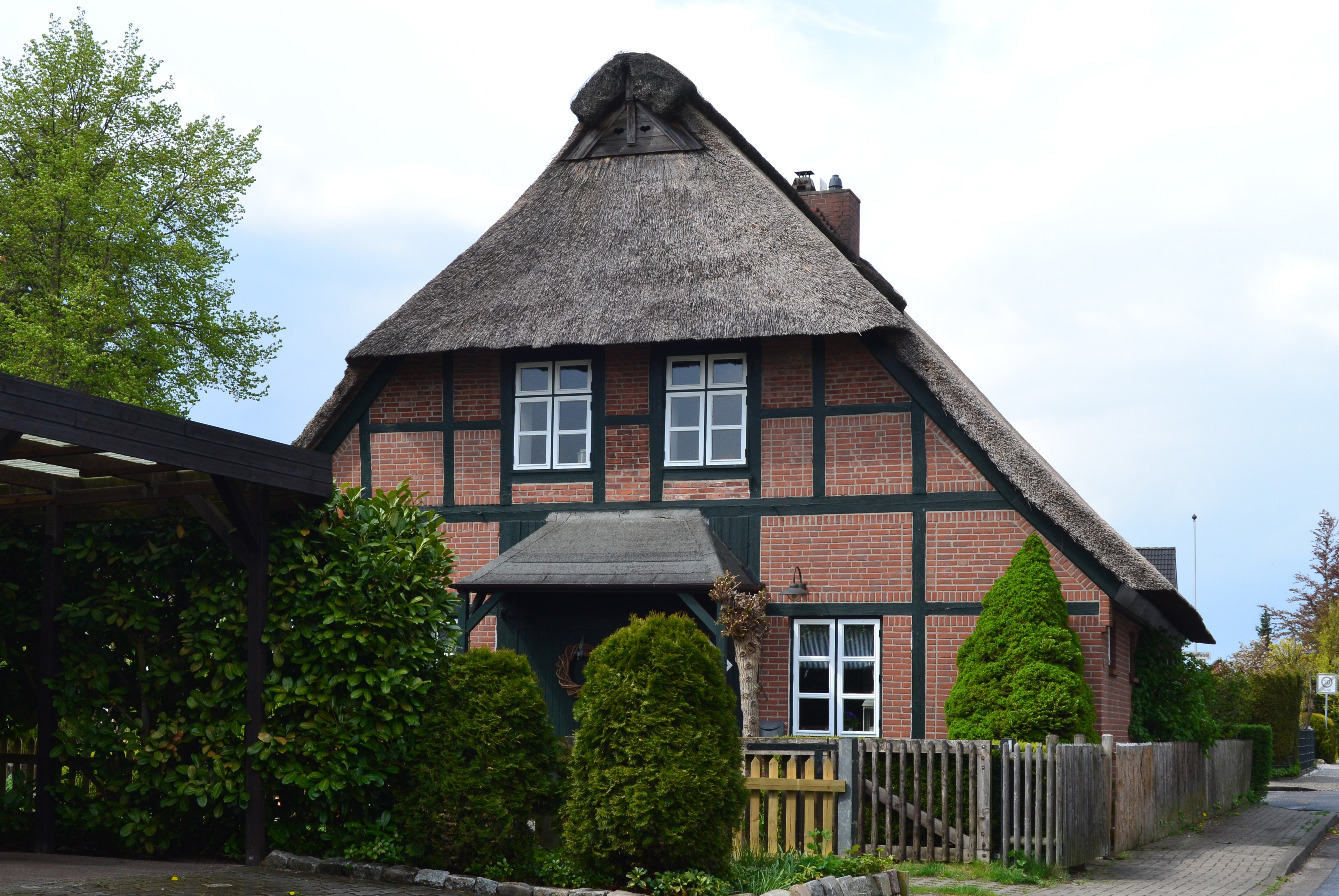 Appen Ehemalige Kate